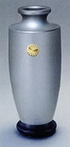 『御紋付銀花瓶』。